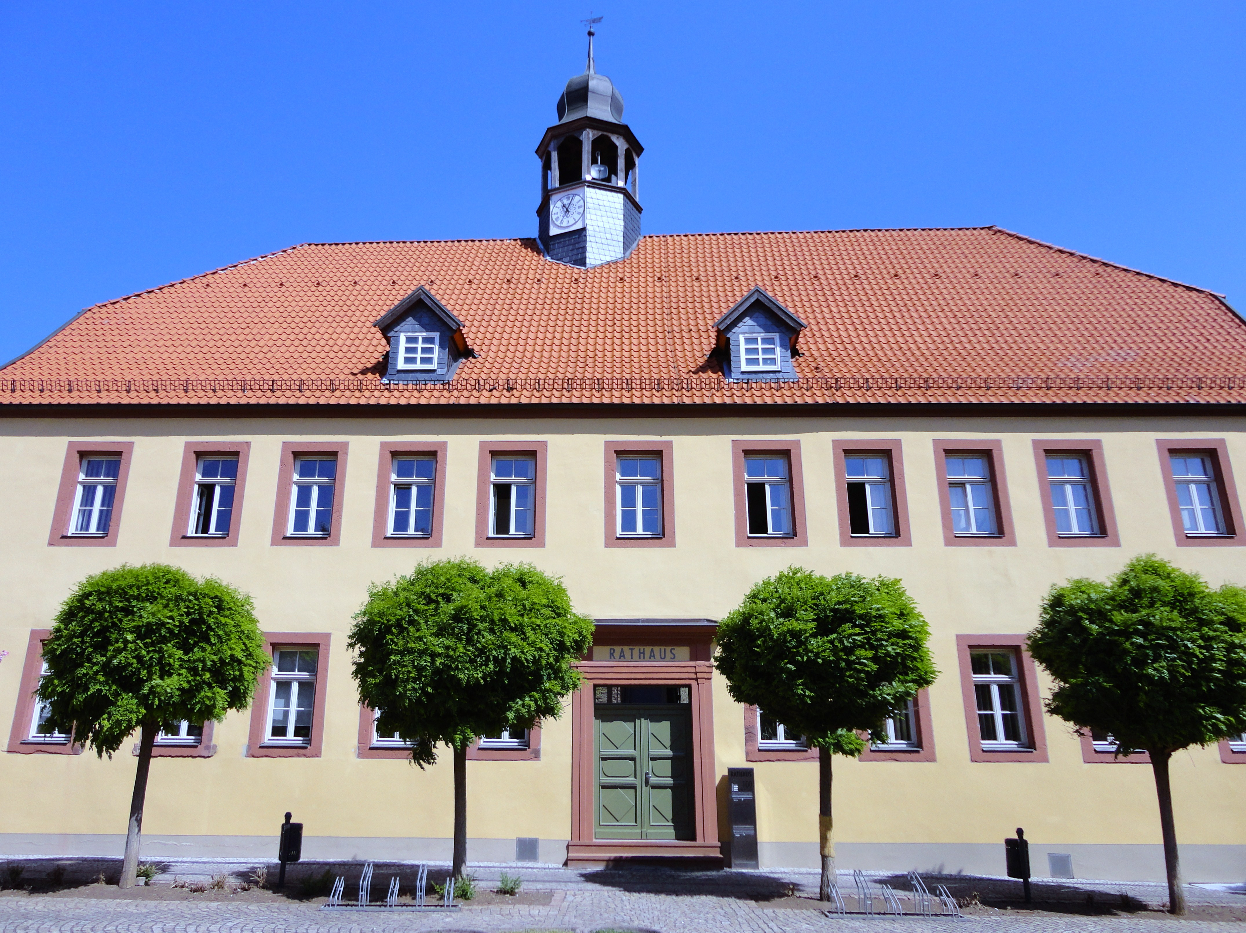 Rathaus der Stadt Heringen an der Helme (Mai 2012).